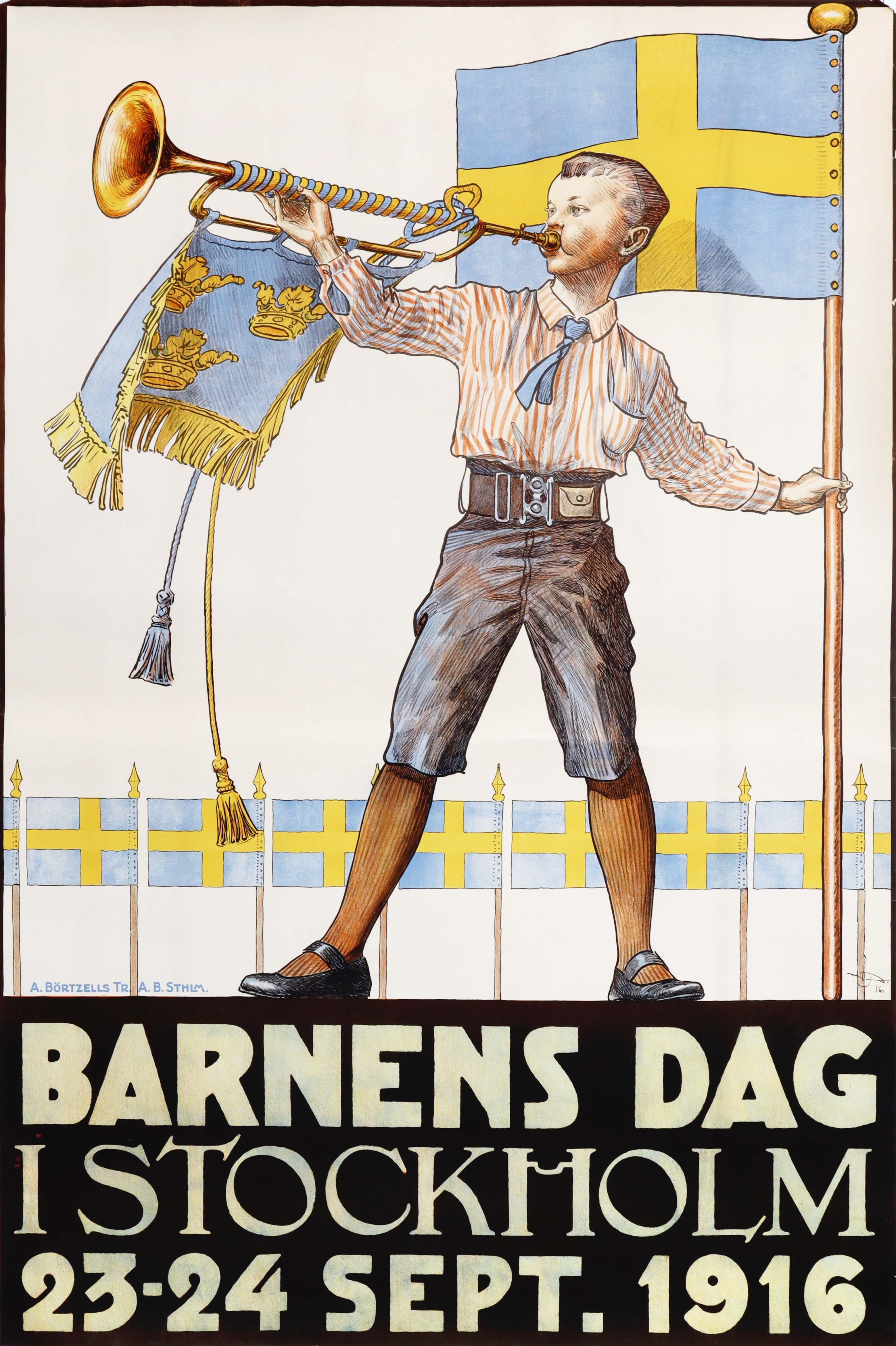 Barnens dags-affisch från 1916 av Vicke Andrén. Välgörenhetsarrangemanget Barnens dag inleddes 1905 i syfte att bereda obemedlade stockholmsbarn sommarvistelse på barnkolonier.